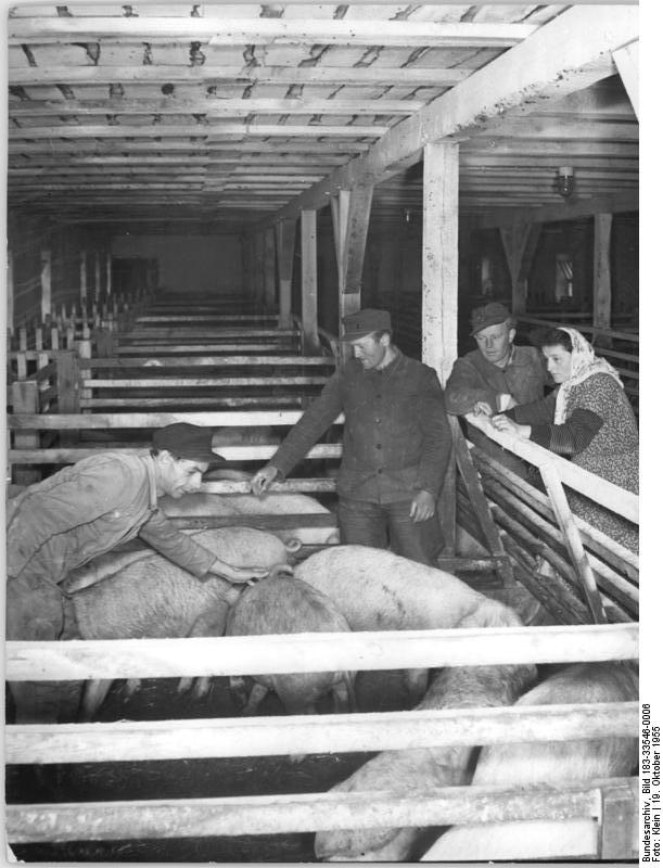 Zentralbild-Klein Me-Th 6 Motive 19.10.1955 LPG Schönfließ schloß sich dem Wilhelm-Pieck-Aufgebot an. Zu Ehren des 80. Geburtstages unseres Präsidenten Wilhelm Pieck beschlossen die 81 Mitglieder der LPG "IV Parteitag" in Schönfließ, Kr. Oranienburg, konkrete Verpflichtungen zur Steigerung der tierischen und pflanzlichen Produktion. Die Baubrigade der LPG, die zum 10. Jahrestag der Bodenreform den Titel "Brigade der hervorragenden Leistungen" verliehen bekam, will im Wilhelm-Pieck-Aufgebot bis zum 1.12.55 zusätzlich ein Futterhaus bauen. Vom 5. April 1955 bis zum Monat Oktober werden von der Baubrigade bereits drei neue Stallungen fertiggestellt. Bis 1960 werden ein Schweinekombinat, ein Rinderkombinat, Abferkelstallungen und ein Geflügelkombinat entstehen. Dieses große Bauvorhaben wird die Baubrigade gemeinsam mit freiwilligen Aufbauhelfern bewältigen. UBz: Der Arbeitsgruppenleiter für die Schweinezucht der LPG, Genossenschaftsbauer Gohlke, (3.v.r.) hatte das Glück, den Kolchos "Lenin" in Gorki, Sowjetunion, zu besuchen. Er überzeugte sich dort von den Vorteilen der Fütterungsmethode, die die Kolchosebauern anwenden und führte diese Methode auch in seiner LPG ein. Dadurch leistete er einen wesentlichen Beitrag zur Erfüllung der Verpflichtungen im Wilhelm-Pieck-Aufgebot. (1.v.r.) die Vorsitzende der LPG Musall.